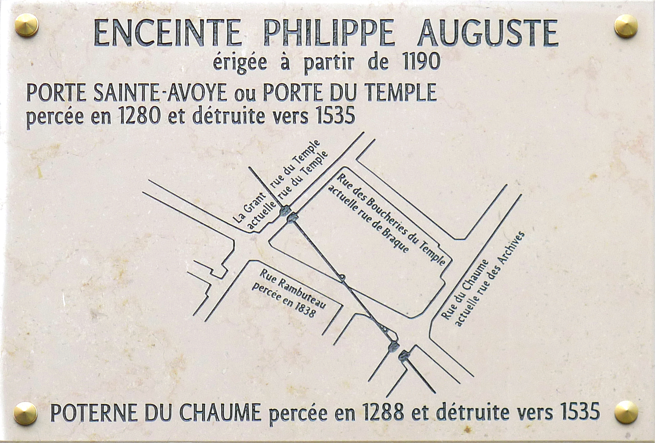 Tracé de l'enceinte de Philippe-Auguste entre la porte de Chaume et celle du Temple (plaque de la ville de Paris fixée au n°6 de la rue Rambuteau) - Paris III et IV